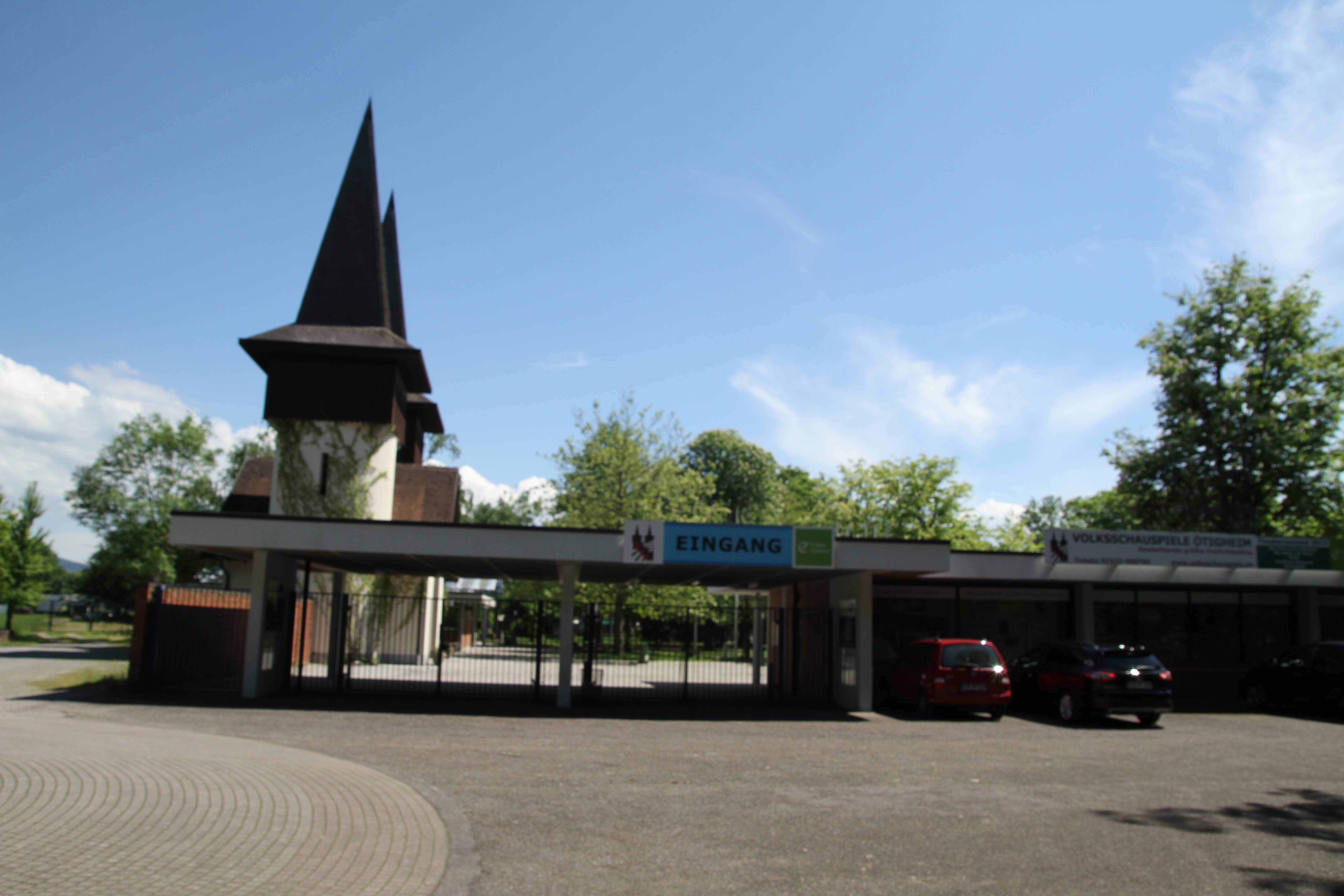 Der Eingang zu den Ötigheimer Volksschauspielen.